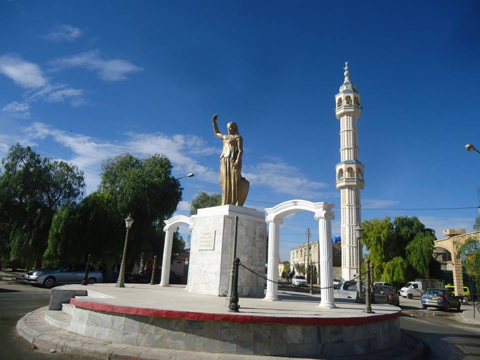 ملكة البربر الكاهنة دهية ببلدية بغاي خنشلة